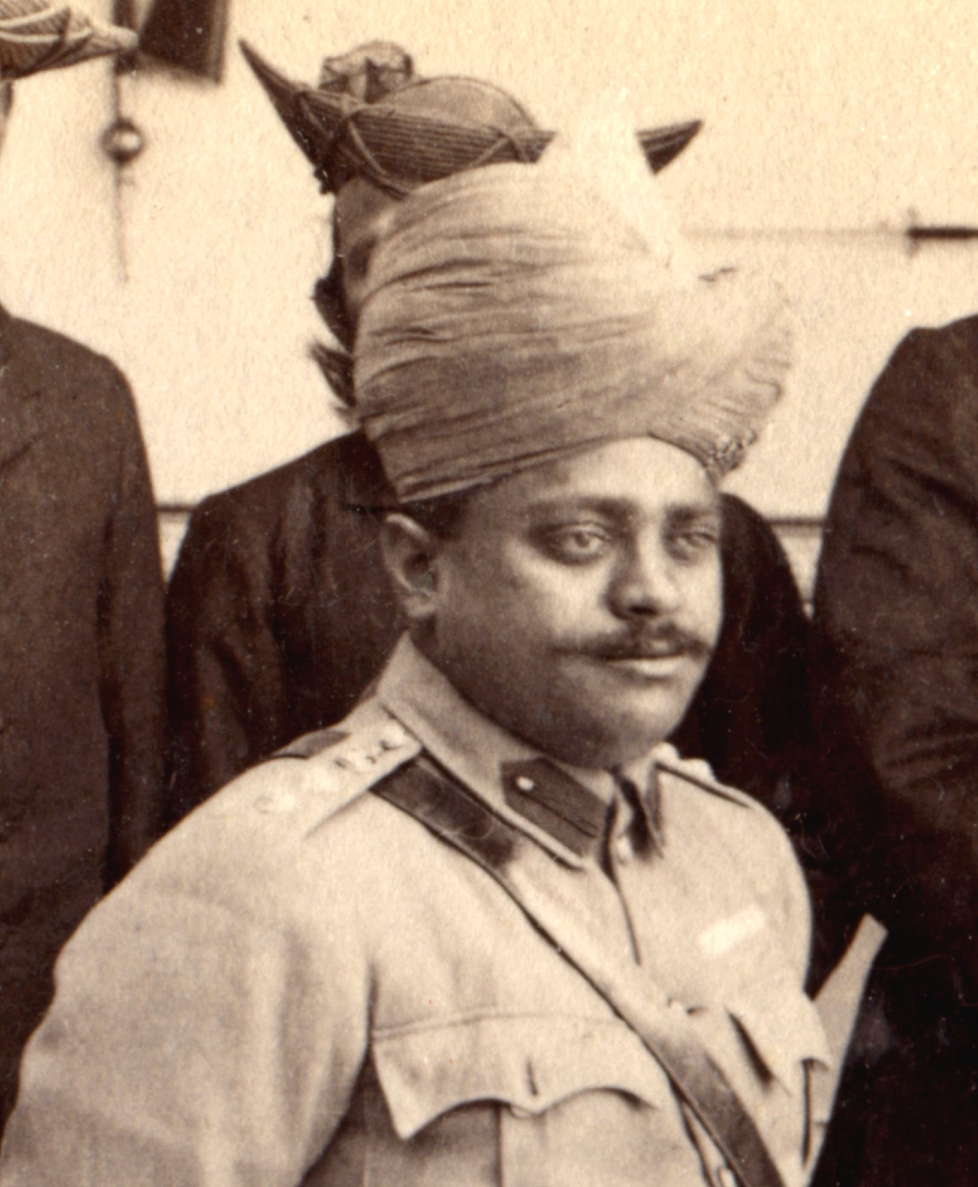 Madho Rao Scindia (1876-1925), Maharaja of Gwalior (1886-1925)